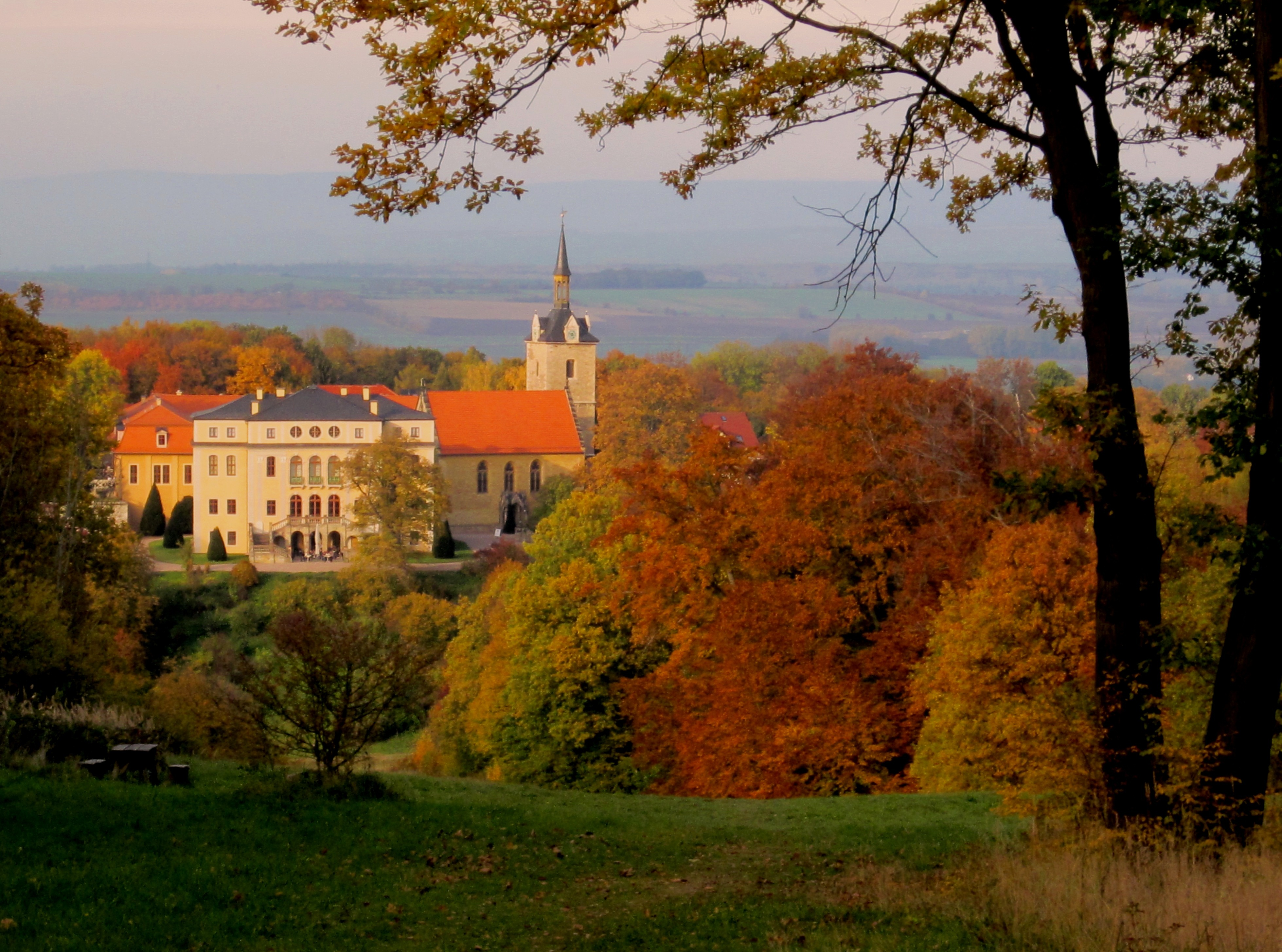 Neues Schloß Ettersburg (1717-1740) und neogot. Schloßkirche vom "Pücklerschlag" gesehen, Blickachse zum Festsaal des Schloßes, Parkgestaltung durch Fürst Pückler und seinem Schüler Eduard Petzold 1844-46